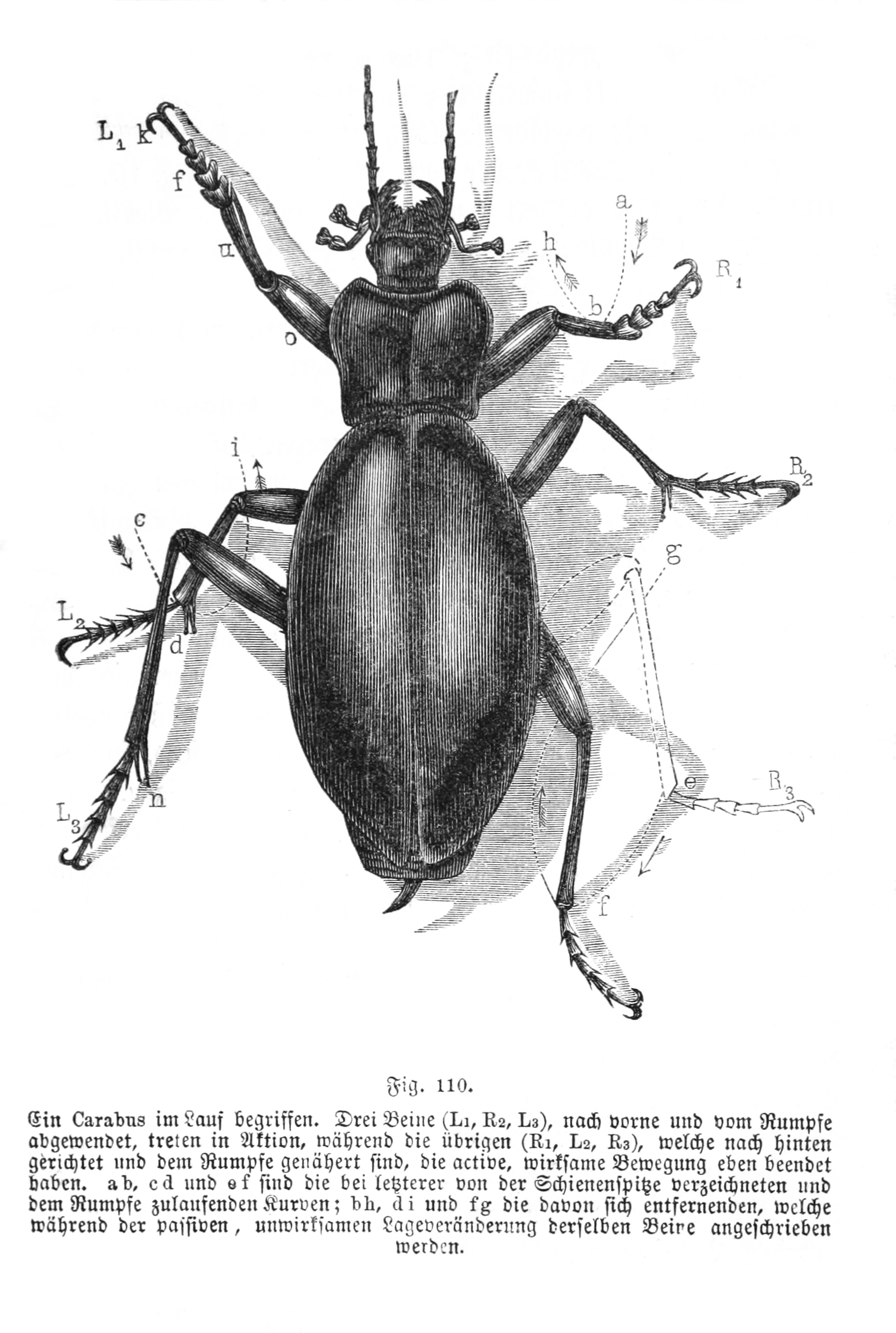 Gait of a Carabid beetle from Vitus Graber, Die Insekten (1877)